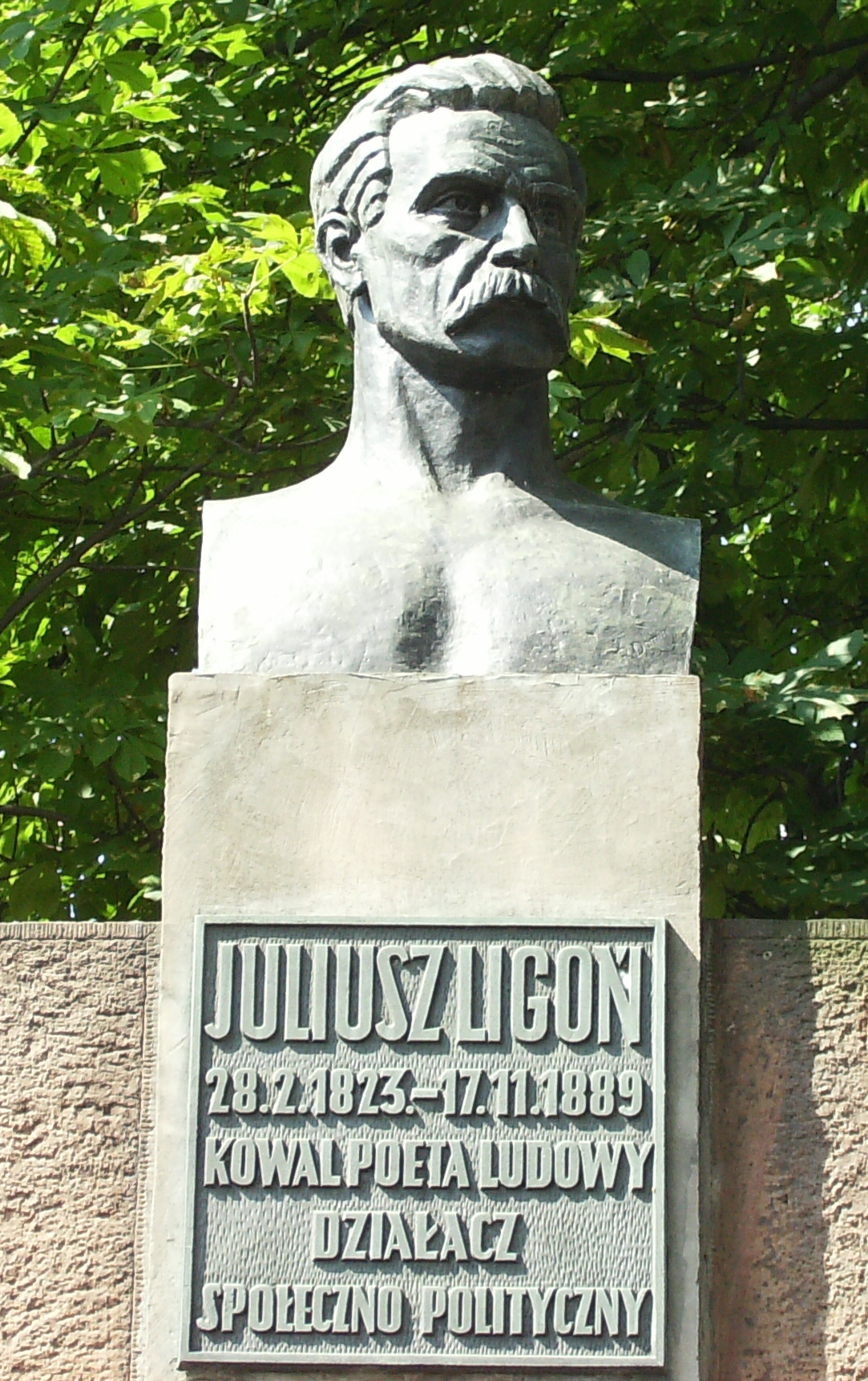 Julisz Ligoń sculpture in Chorzow